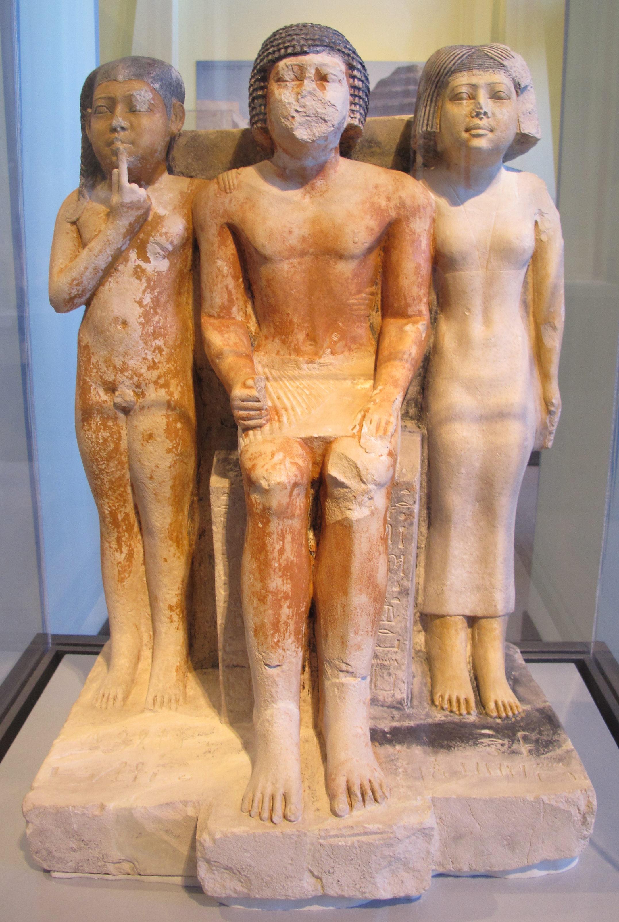 Egyptian antiquities in the Brooklyn Museum